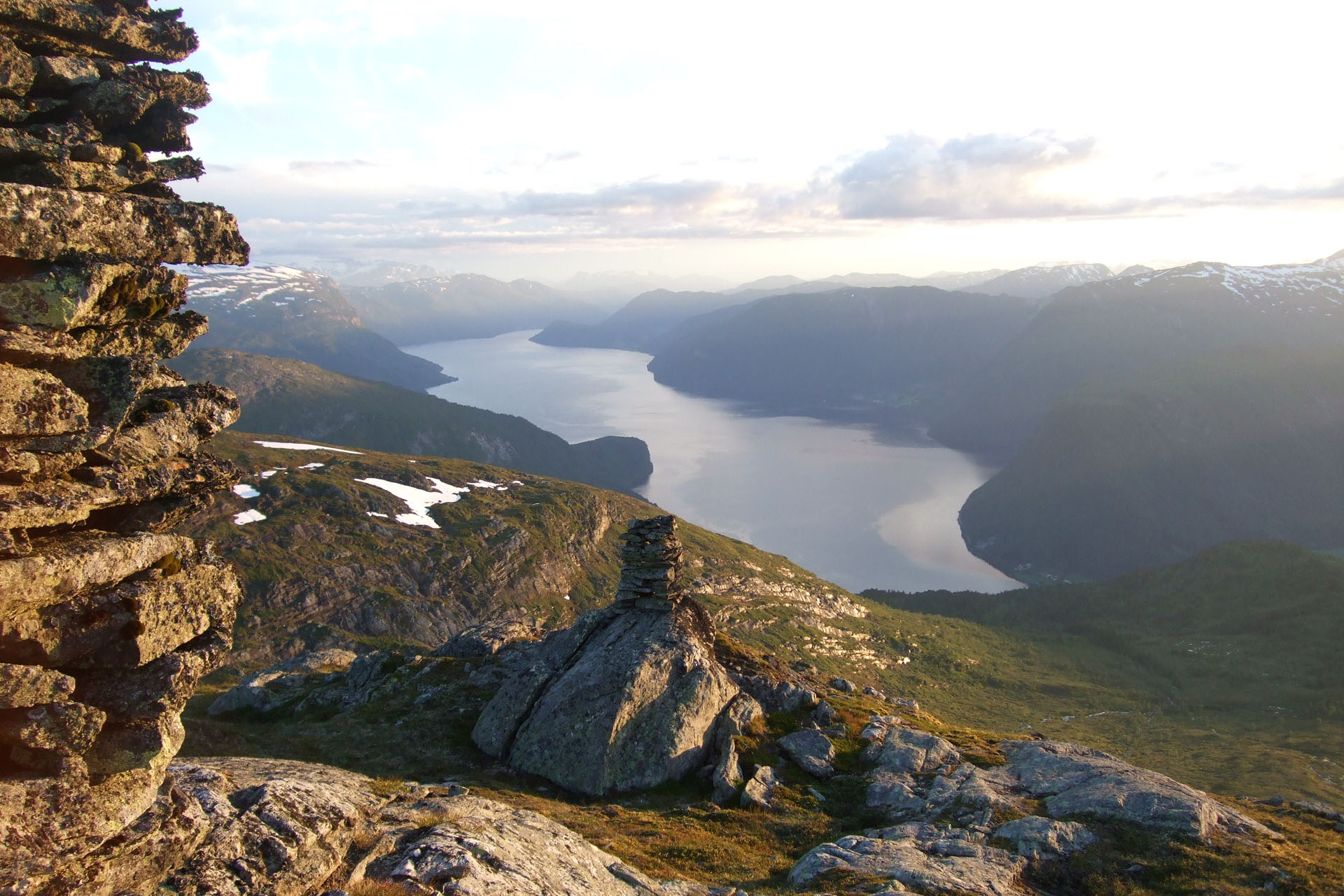 Utsikt fra Storehornet mot Hornindalsvatnet